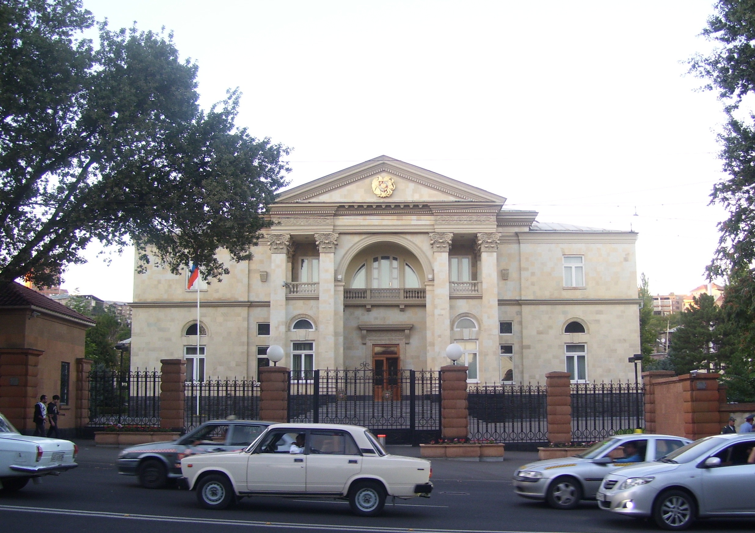 ՀՀ Նախագահի նստավայր, 1958 թ., Մարշալ Բաղրամյան պող. 26, Ճարտ.` Մ. Գրիգորյան, նախկինում` Գերագույն խորհրդի նախագահության վարչական շենք 6/162